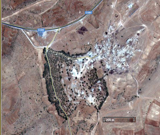 Ziyaret Köyü uydu resmi